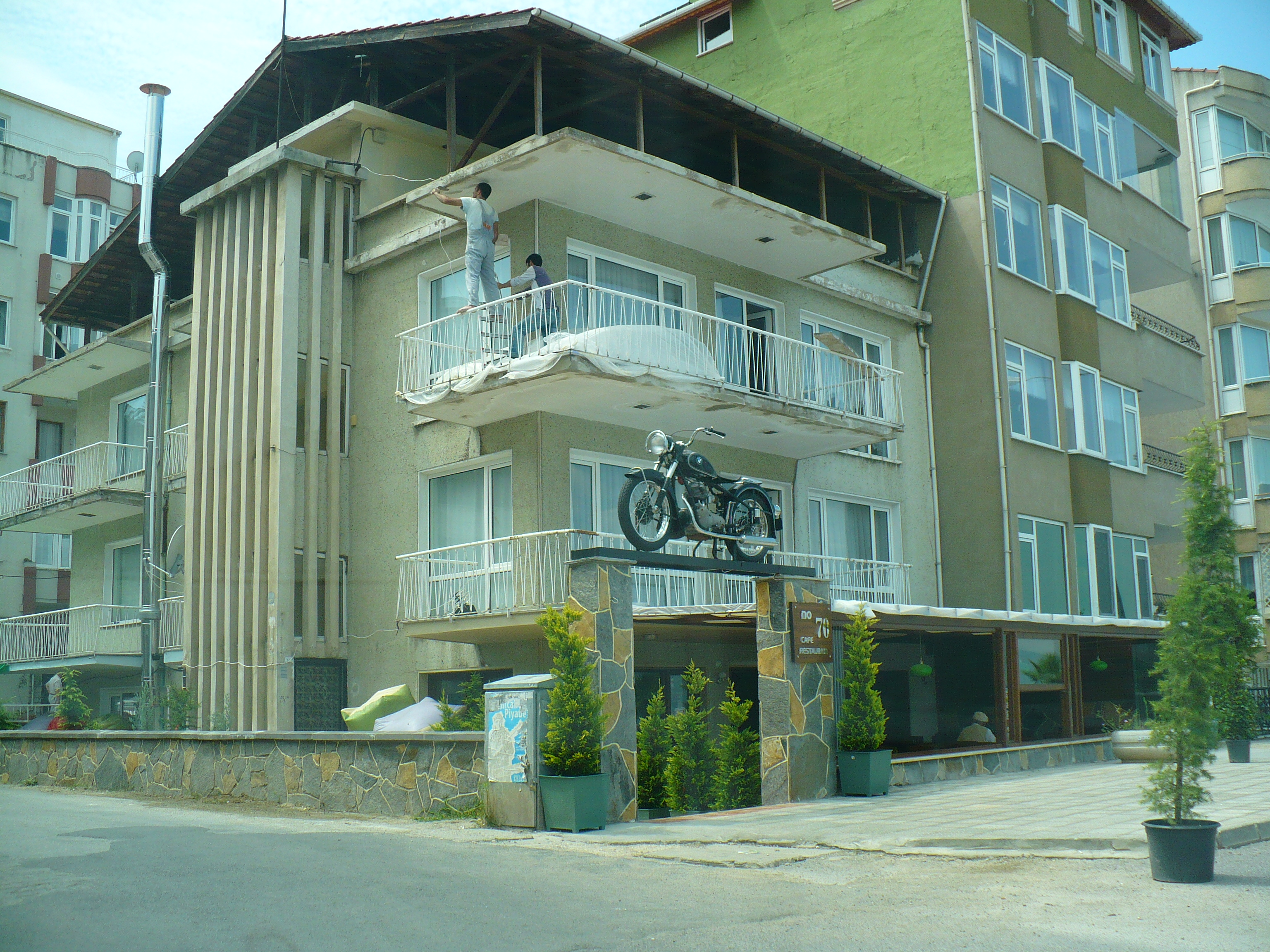 Gölcük'den görüntüler